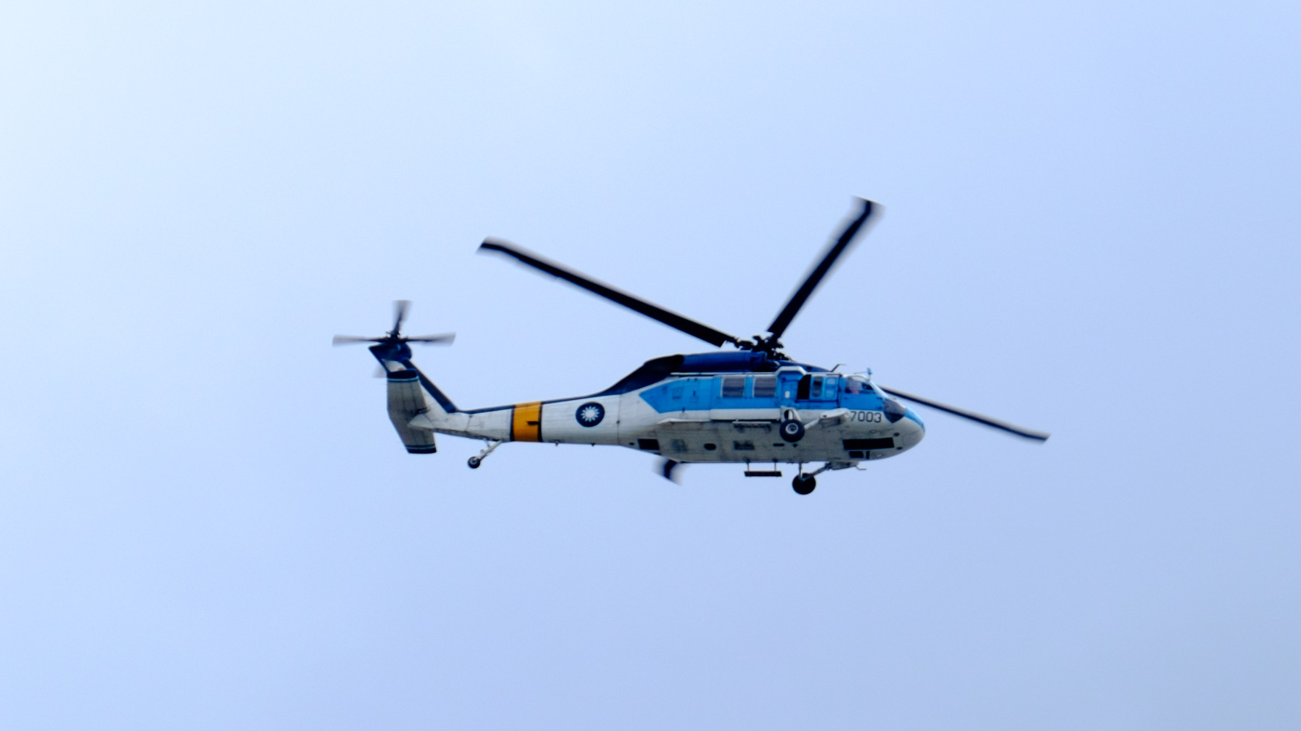 支援新北市八里八仙水上樂園氣爆案傷患後送，從空軍松山基地起飛的空中救護隊S-70C 7003。